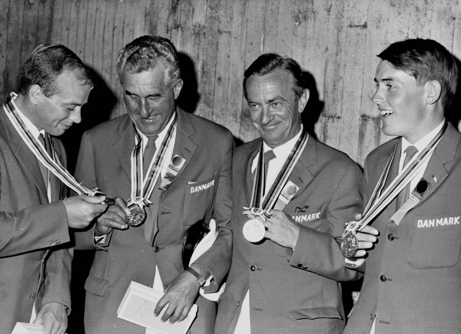 Left-right: Henning Wind, Ole Berntsen, Christian von Bülow, Ole Poulsen